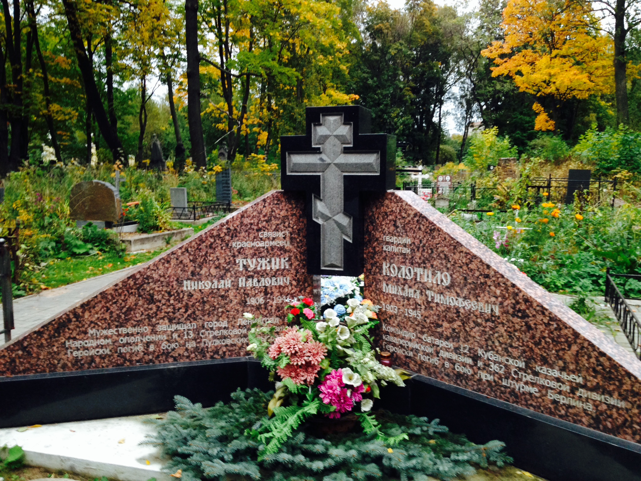 Крест-памятник (кенотаф) двум воинам, погибшим во время Великой отечественной войны: Тужику Николаю Павловичу и Колотило Михаилу Тимофеевичу. Установлен на Глазуновской дорожке Волковского православного кладбища в Санкт-Петербурге.